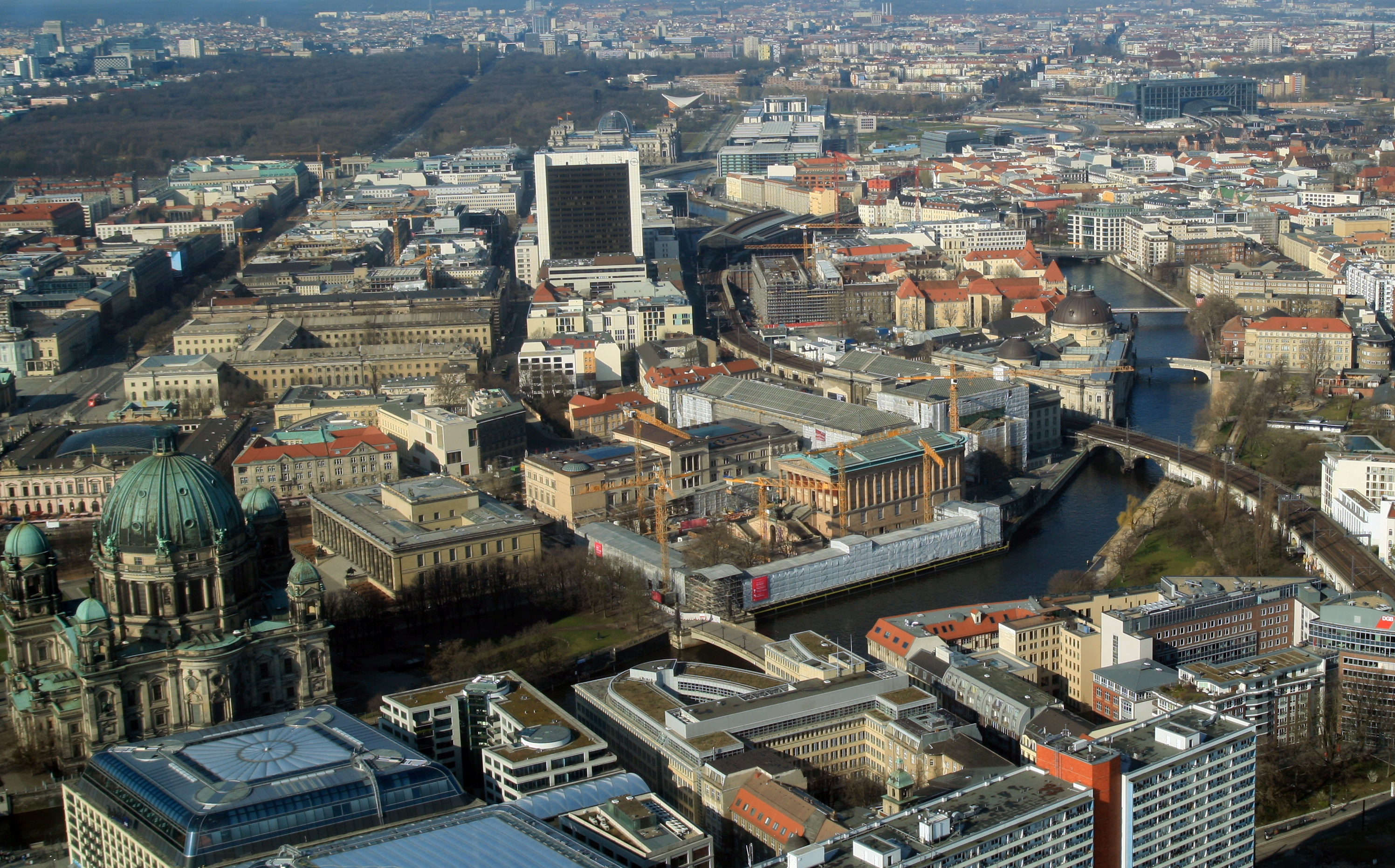 Museuminsel vom Fernsehturm aus fotografiert